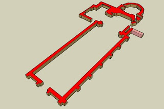 Empreinte au sol de l'église romane de Brissarthe. Sa particularité est de ne pas posséder de bras droit de transept. Bien que cela ne puisse pas être vérifié, il semble que l'effondrement de l'ancien clocher, frappé par la foudre en 1730, ait détruit ce bras droit. A sa place, a été construit au XVIIIè siècle un magnifique presbytère. Le nouveau clocher a été érigé, entre 1730 et 1740, sur les piliers du bras gauche du transept.